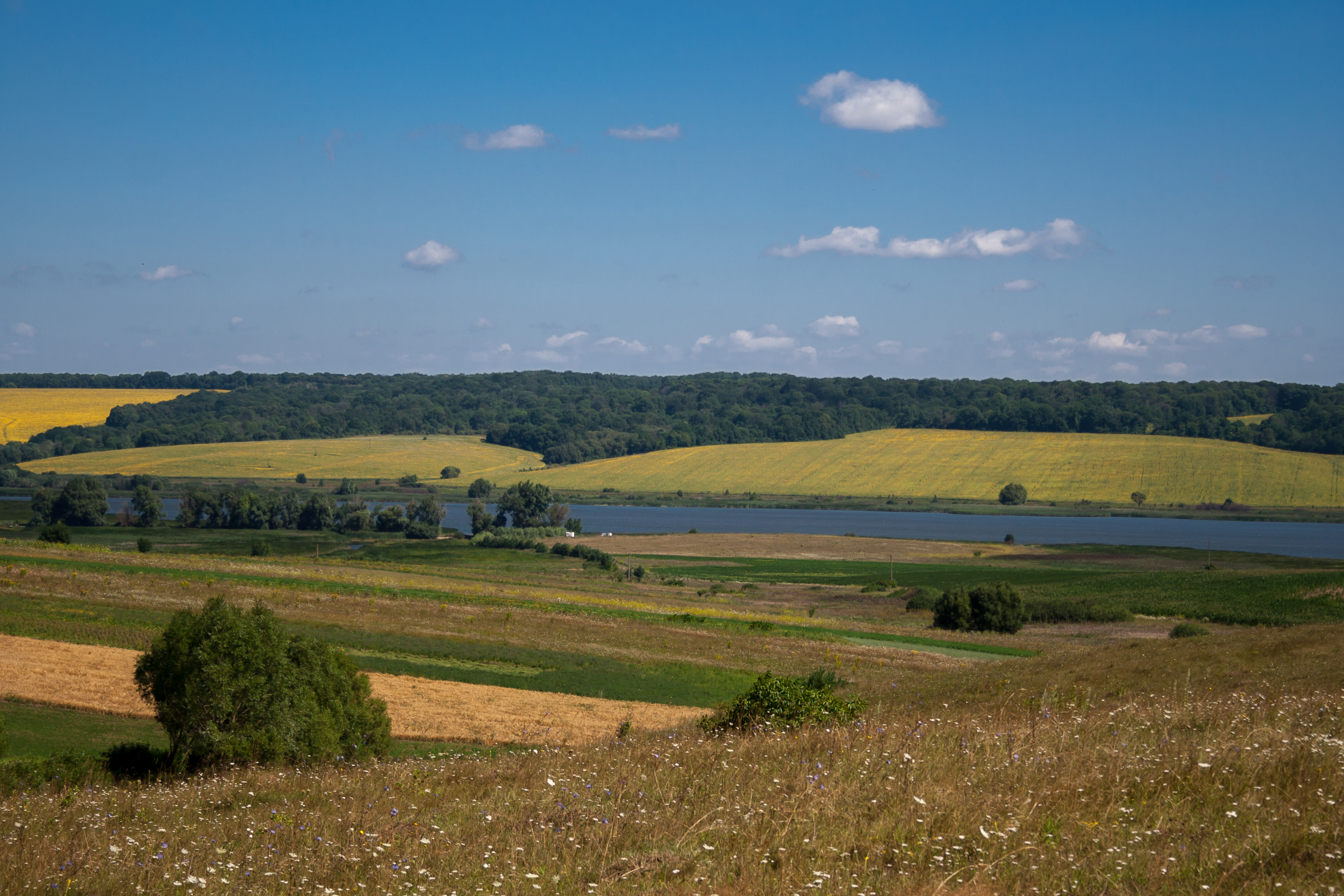 Моломолинцівський, Хмельницький район, заплава р. Бужок від с. Печеське до с. Редвинці